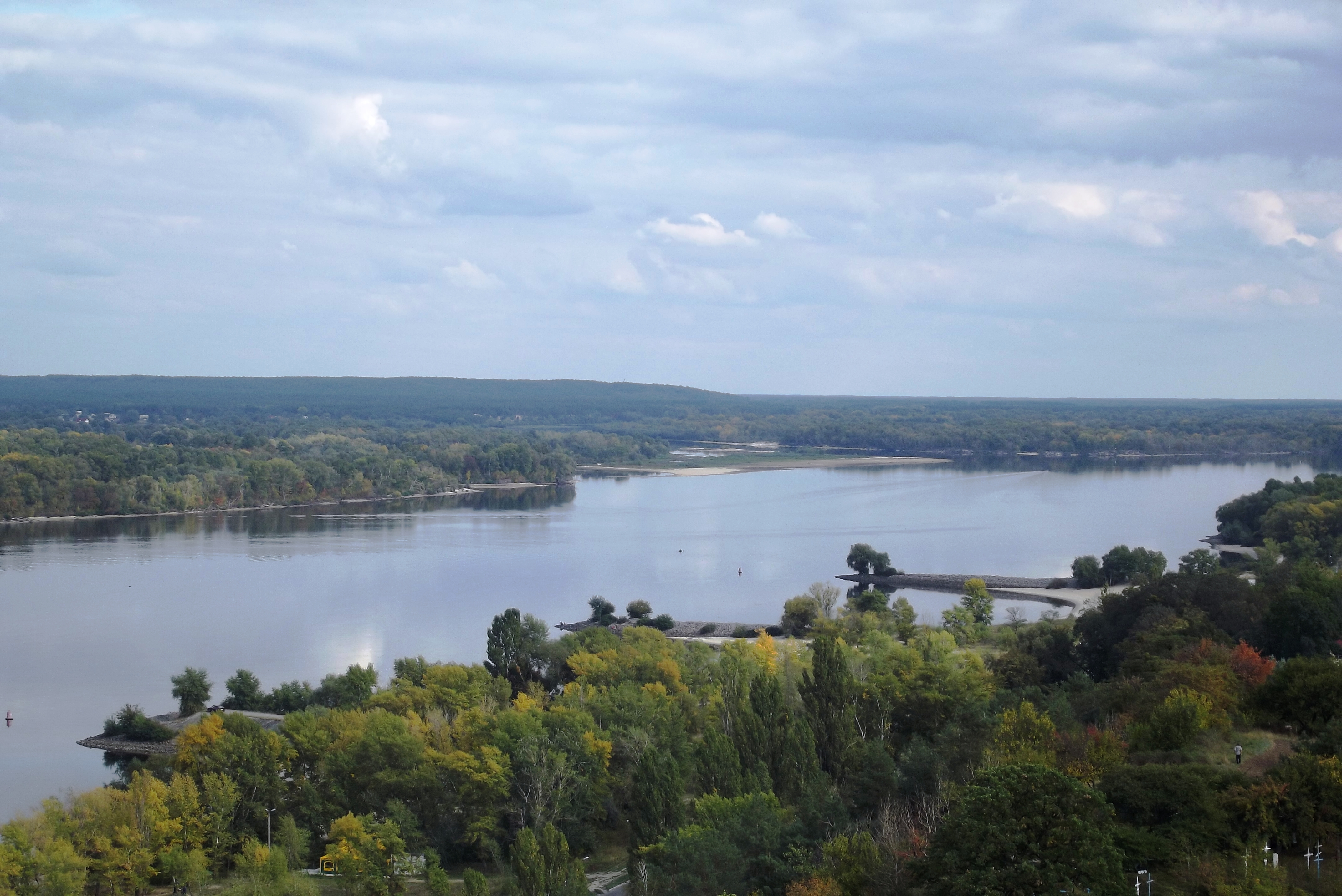 Річка Дніпро (Україна)